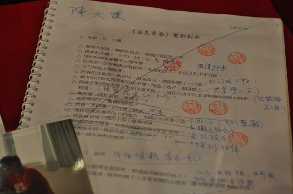 中影公司電影《皮克青春》劇本。